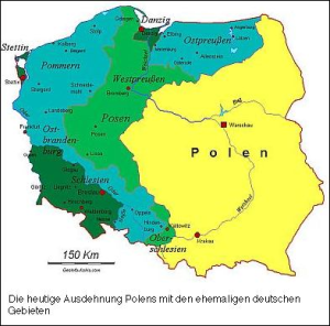 deutschreich in polen